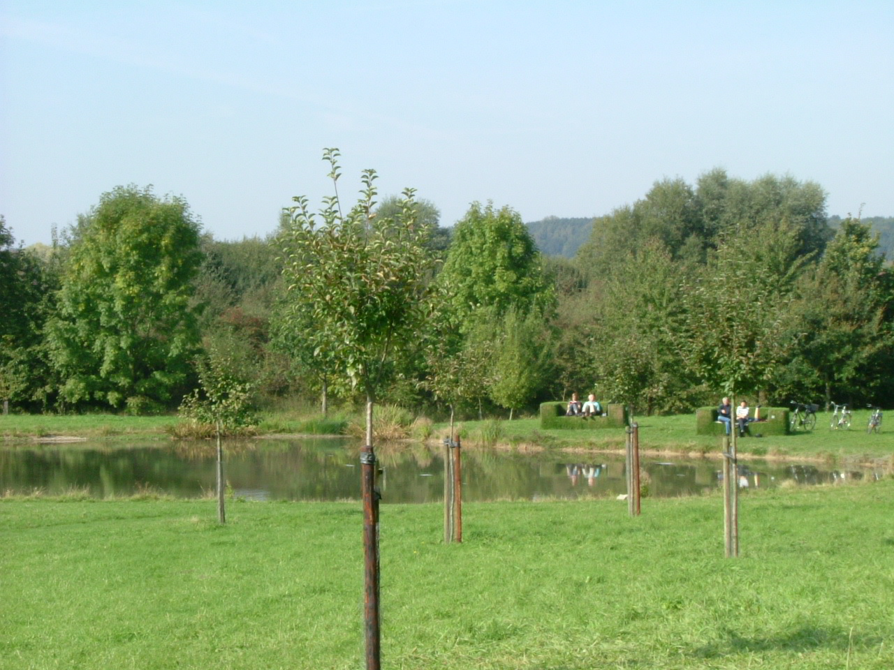 Rabental bei Gut Melaten mit den Obstbäumen des Lebensbaumprojektes (im Vordergrund) und den Grassofas der Bürgerstiftung Lebensraum Aachen